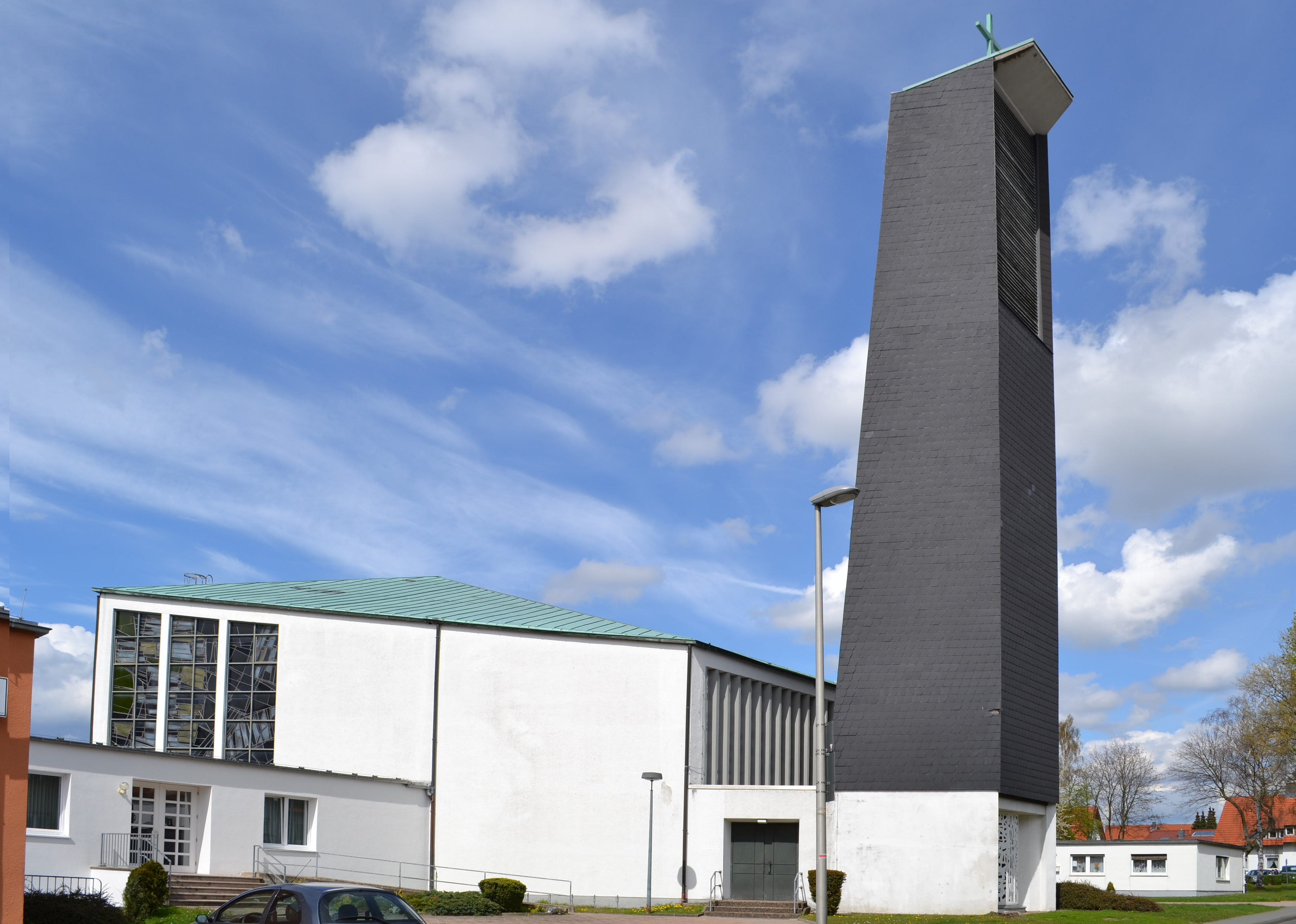 Katholische Kirche "St. Marien", Detmold, Bergstraße 46